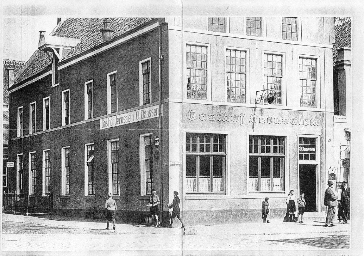 Zu sehen ist der Gasthof Jerusalem von Claas Claassen in der Osterstraße in den 20er-Jahren des zwanzigsten Jahrhunderts. Der Gasthof wurde bereits im Jahre 1600 zugelassen. Er war eine Gast- und Ausspannungswirtschaft, die vor allem von Bauern aus der Ostermarsch besucht wurde. Es konnten hier ca. 100 Pferde untergestellt werden. Eine Besonderheit war der Bierkeller mit separatem Eingang an der Marktseite. Der Gasthof wechselte wahrscheinlich mehrfach seinen Besitzer. Seit dem 15. August 1921 war er in Besitz der Familie Claas Claassen. 1962 wurde der Gasthof abgebrochen; an seine Stelle trat ein Neubau der Deutschen Bank.